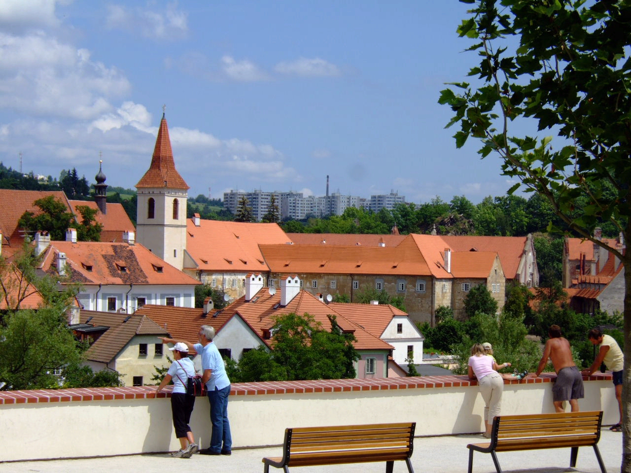 Český Krumlov: Blick über die Altstadt - im Hintergrund eine Vorstadt Aufnahme: 10. Juli 2006 Url